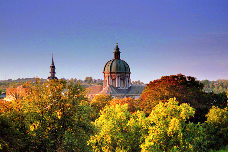 Cathédrale saint-Aubain vue de la citadelle